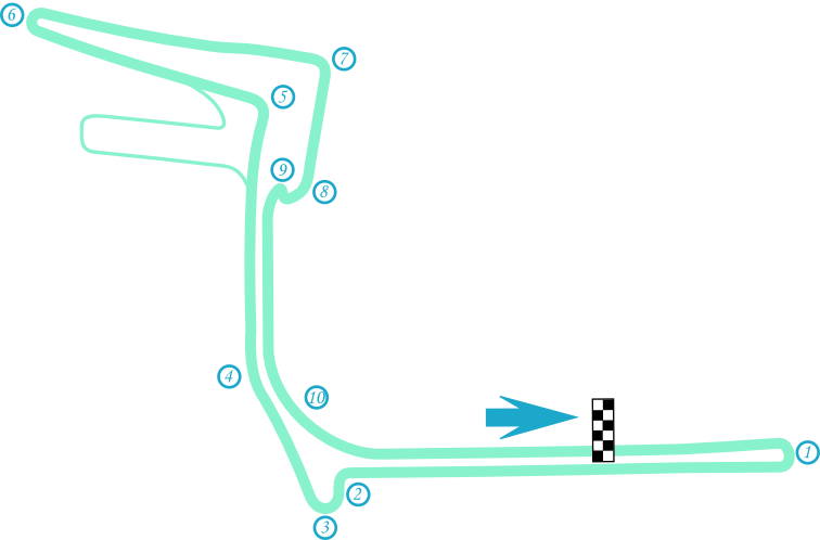 Reale tracciato di New York.